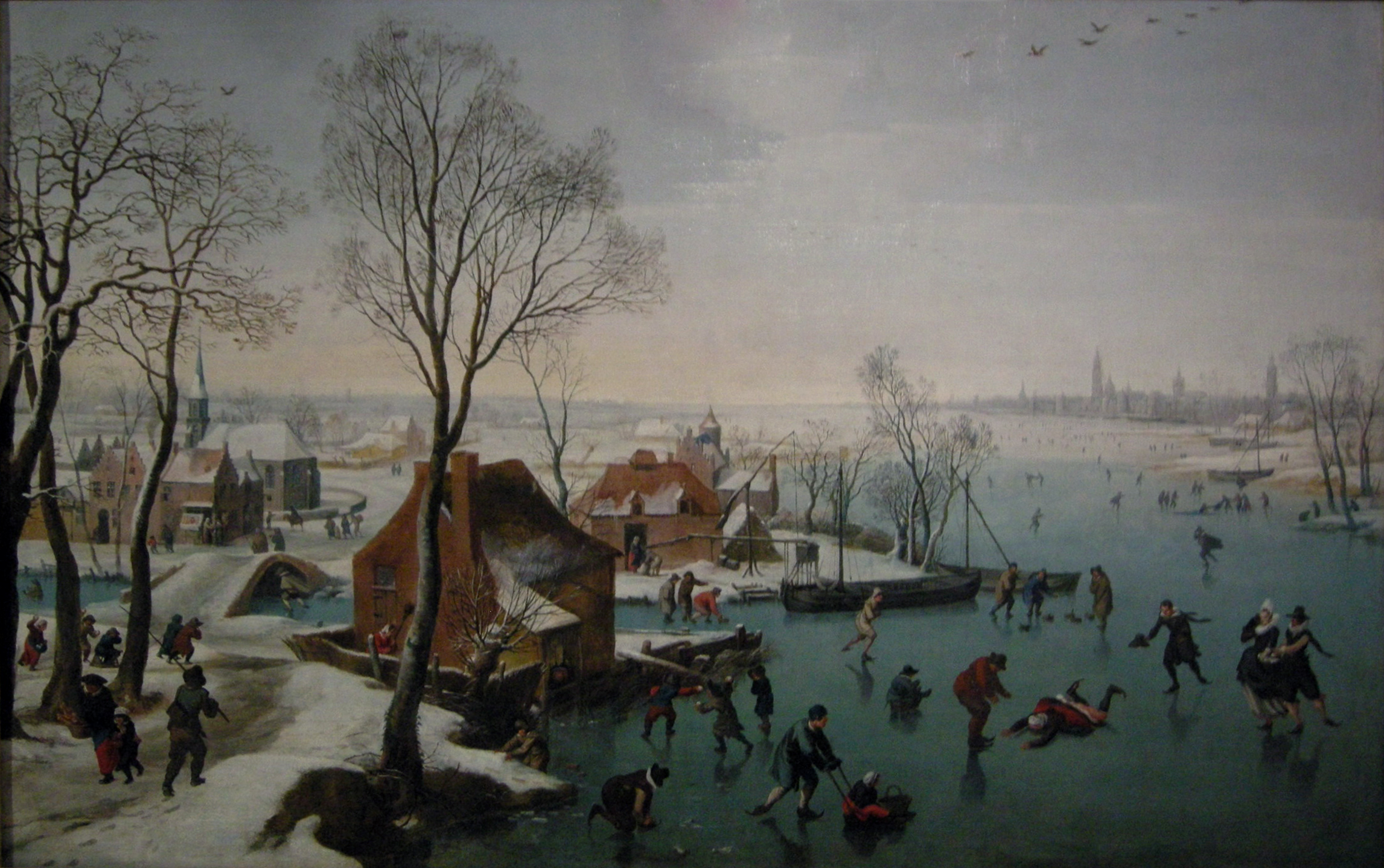 gennaio, pattinatori sul giacchiotitle QS:P1476,it:"gennaio, pattinatori sul giacchio" label QS:Lit,"gennaio, pattinatori sul giacchio"